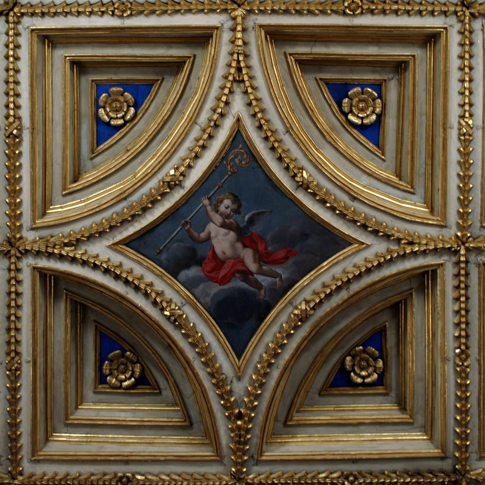 Cathédrale Città di Castello-Détail caisson plafond'Ombrie-Italie